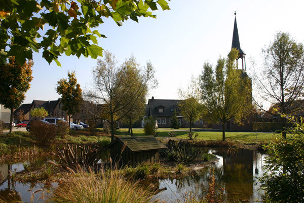 Dorfplatz in Neu-Etzweiler